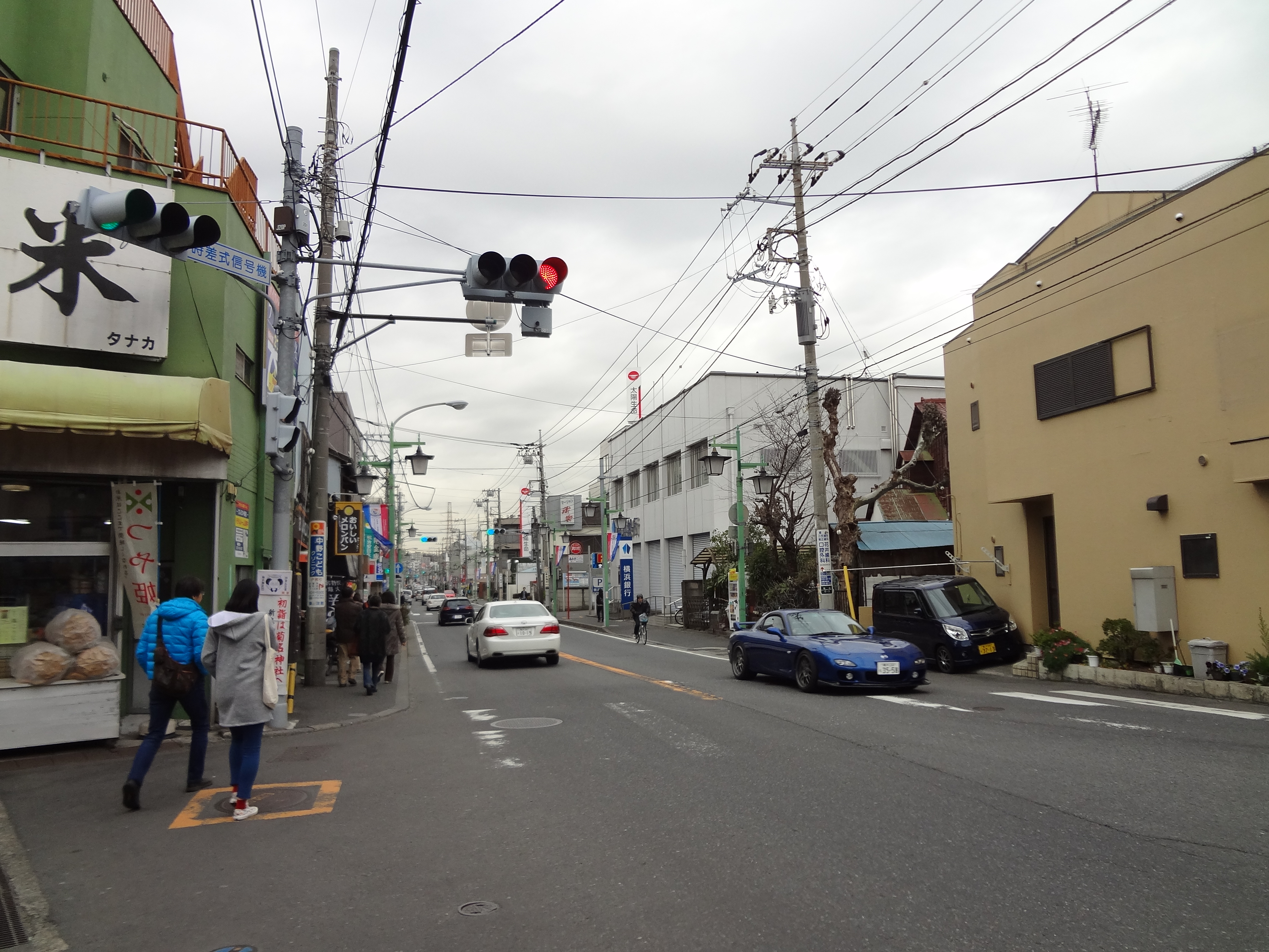 綱島街道 菊名駅前付近（2016年1月23日）